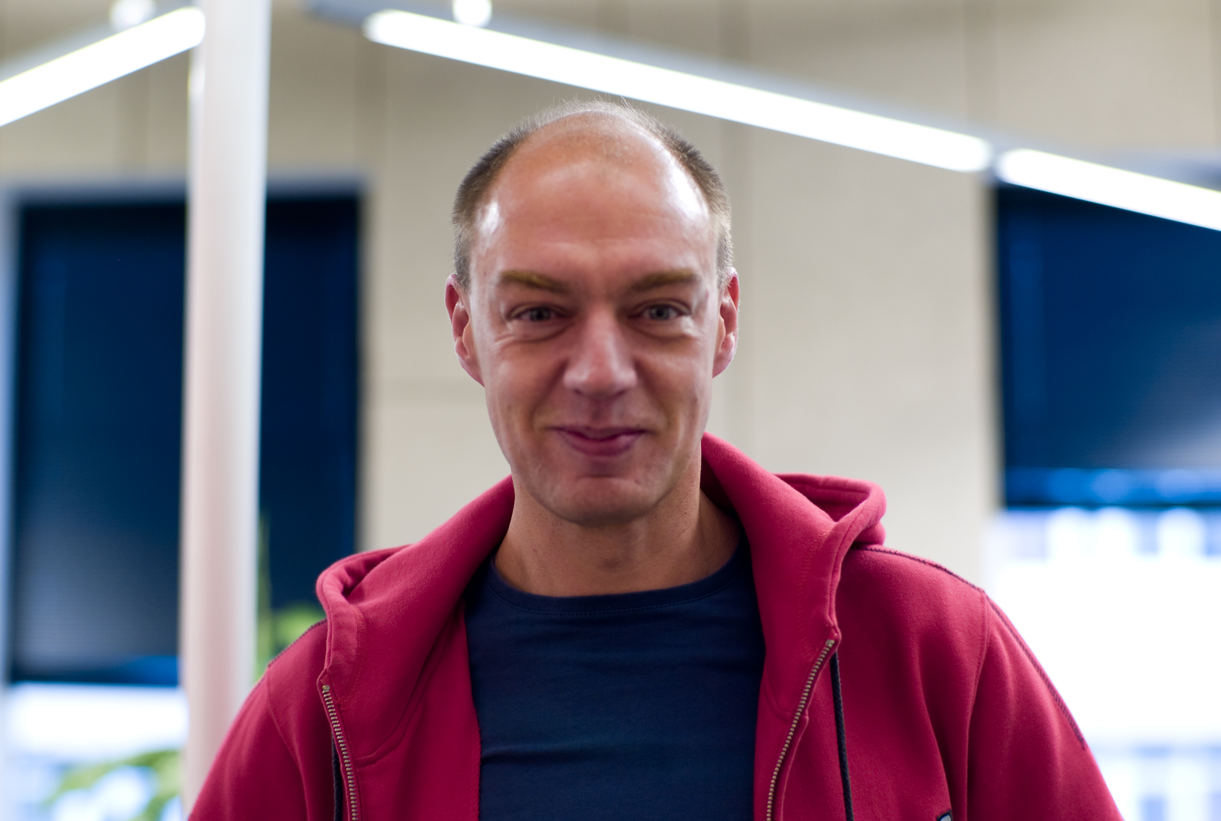 Linnar Viik, 2007.